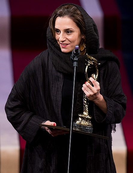 نگار نعمتی در بیستمین جشن بزرگ سینمای ایران